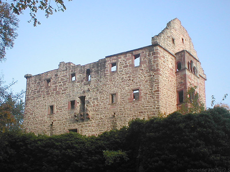 Palas der Minneburg bei Neckargerach, Baden-Württermberg, Deutschland